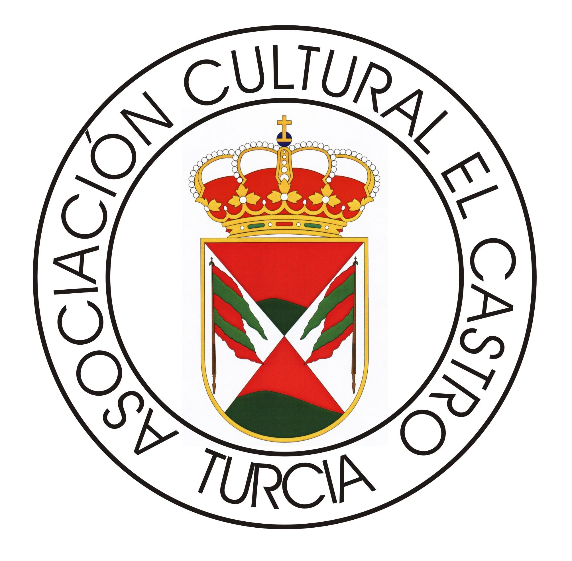 Escudo de la Asociación Cultural El Castro.